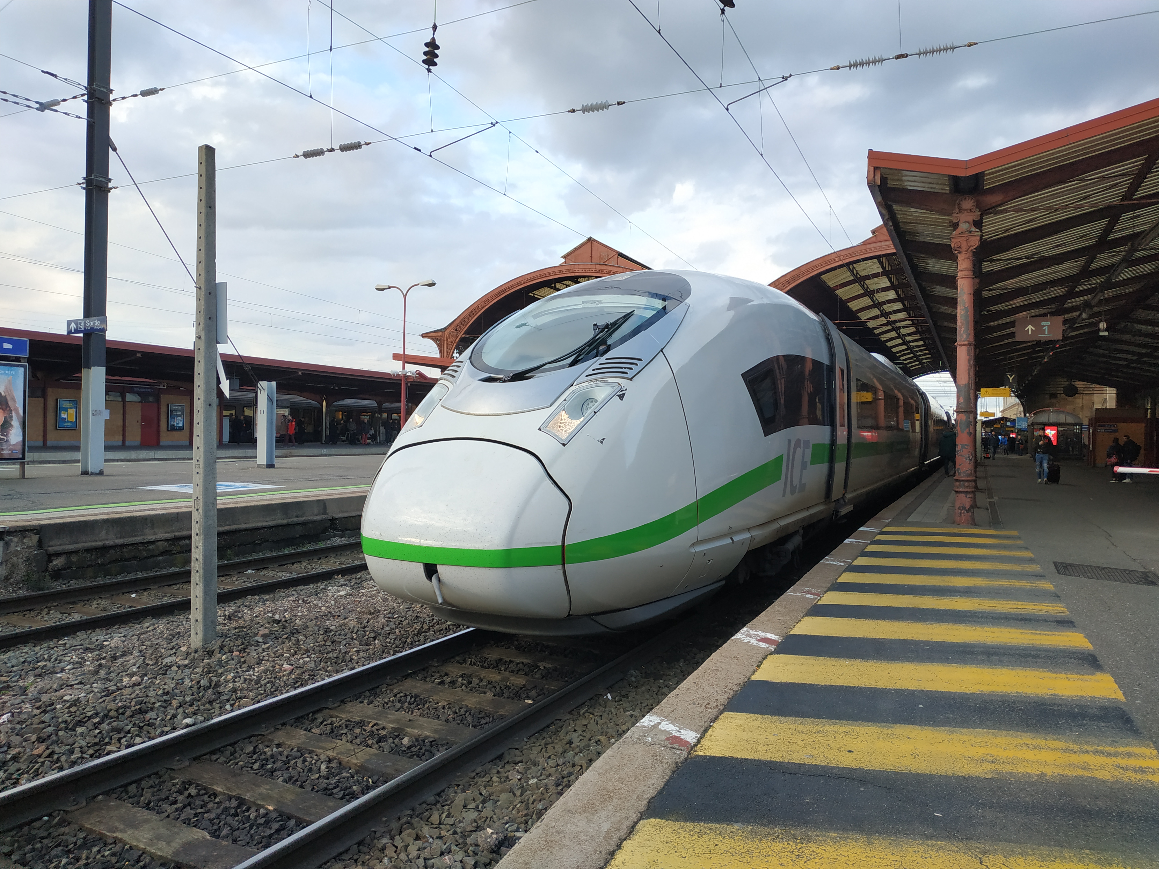 ICE 3 (Velaro D) n°409 assurant une liaison de la France vers l'Allemagne en gare de Strasbourg